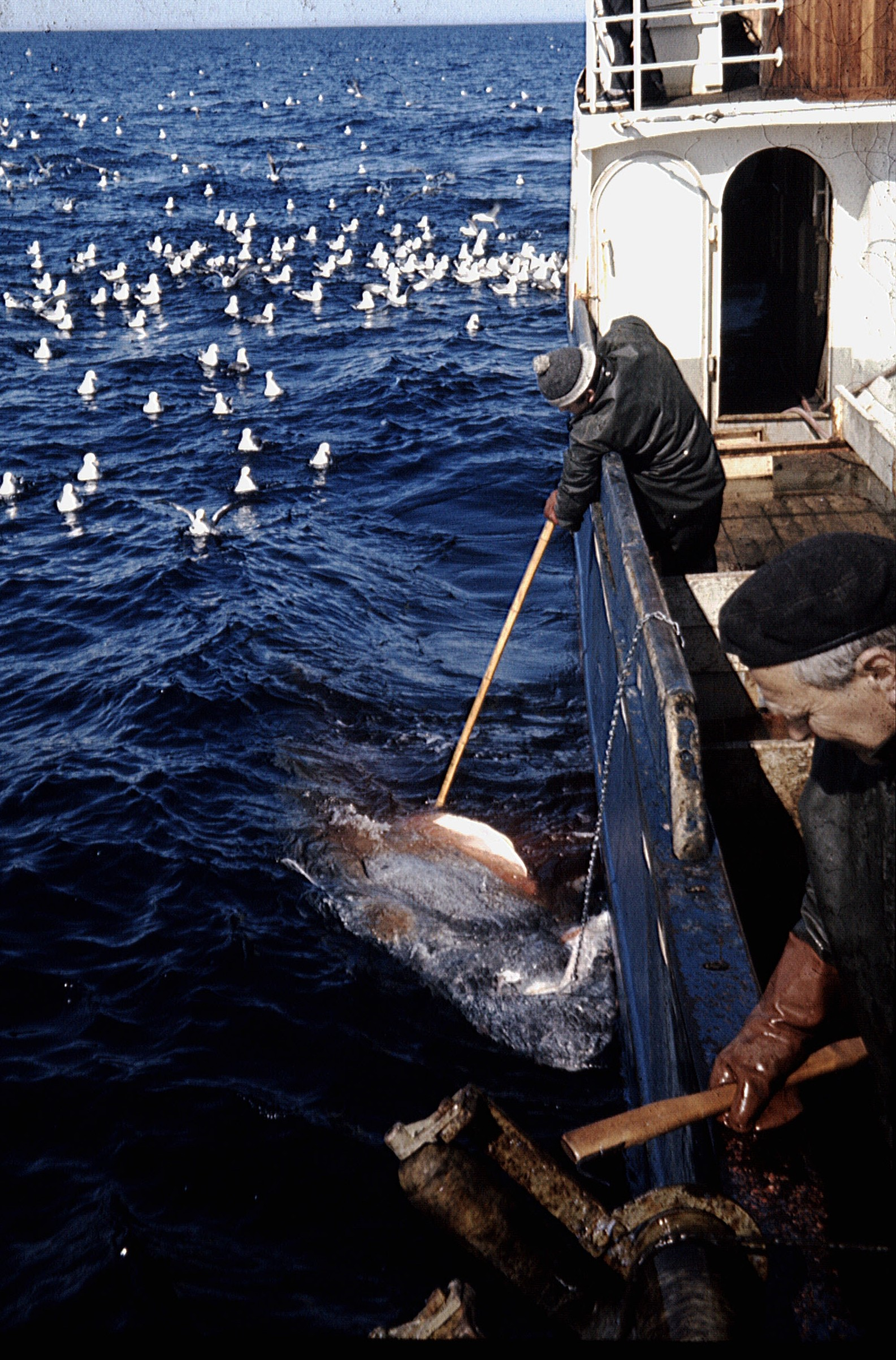 Håkjerring er fiska på line